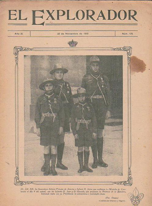 Revista El Explorador, Año XI, Número 176, 23 de noviembre de 1923. En portada los hijos de Alfonso XIII en uniforme de Exploradores de España.